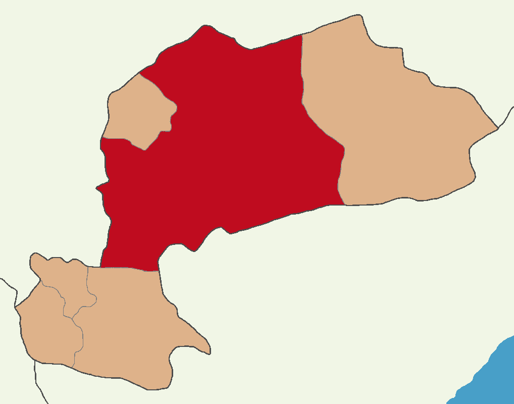 Karaman Merkez ilçesinin konumu